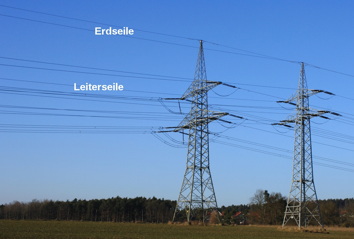 Darstellung von Erd- und Leiterseilen an einer Freileitung